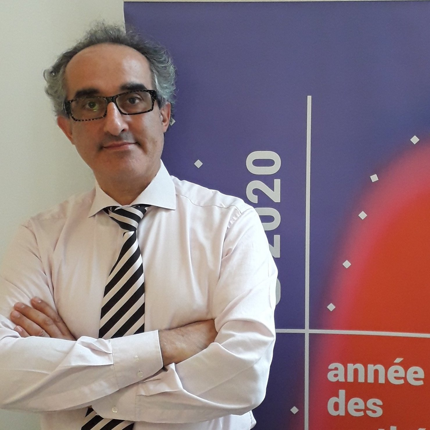 Portrait de l'inspecteur général Charles Torossian, en octobre 2019, en marge de l'année des mathématiques